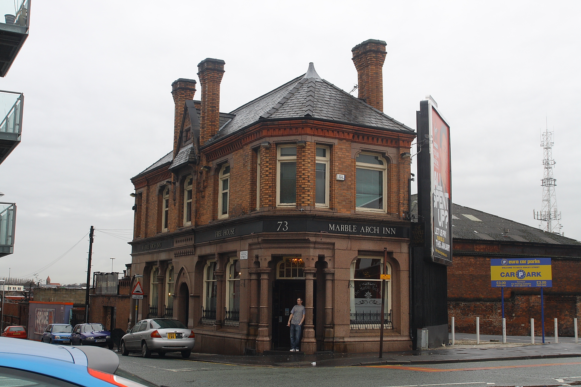 Marble Arch Inn Manchester at: 73 Rochdale Road, Manchester, M4 4HY